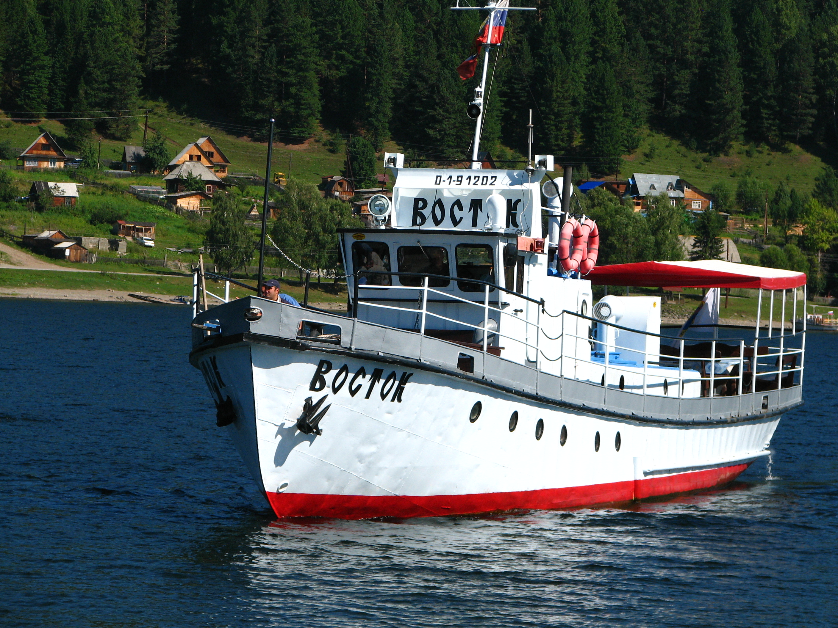 Северная оконечность. Один из экскурсионных катеров на Телецком озере. За ним — посёлок Артыбаш